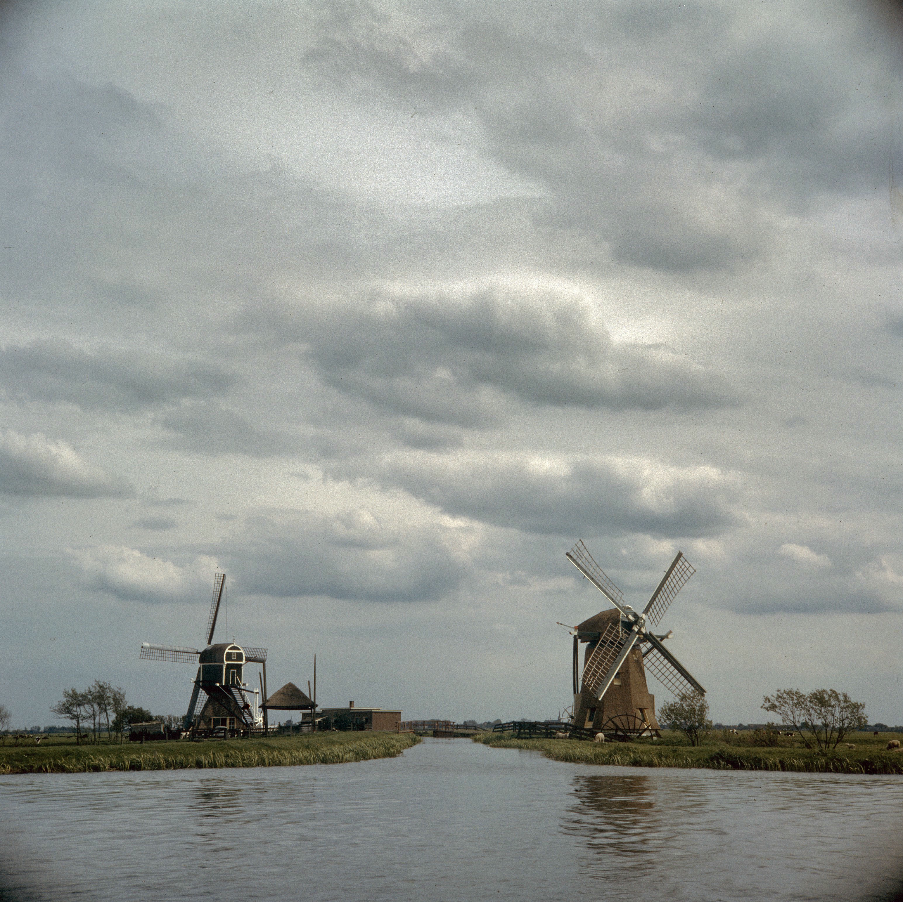 Doeshofmolen: Vergezicht op de Doeshofmolen, de Achthovense Molen op de achtergrond (opmerking: Diacollectie Molens) Achthovense Molen